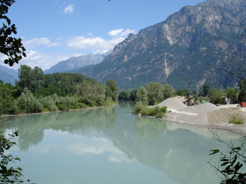 Fiume Mera